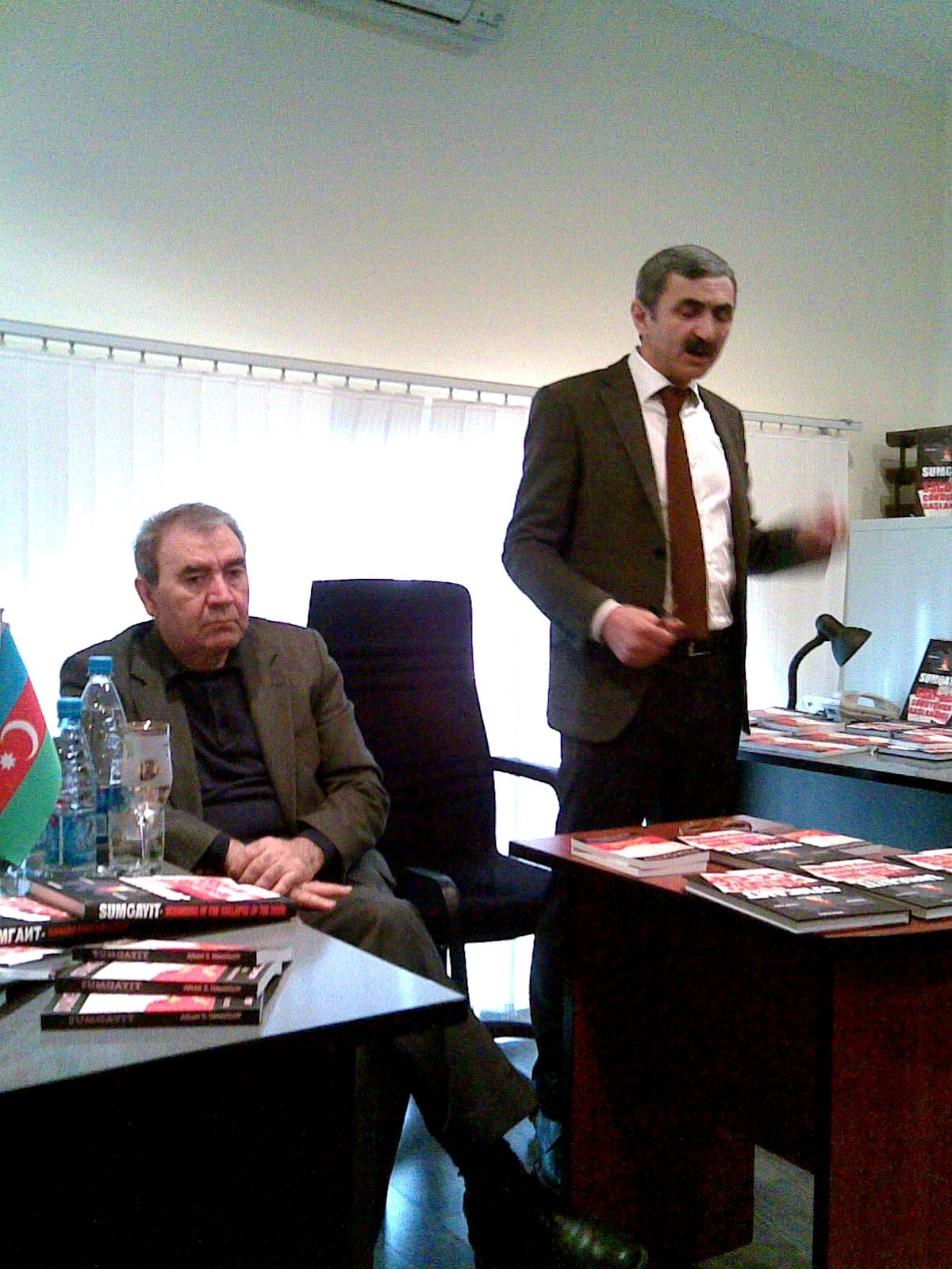 Aslan İsmayılov və Cəmil Həsənli. Sumqayıt hadisələri haqqında kitabın yeni nəşrinin təqdimatında.